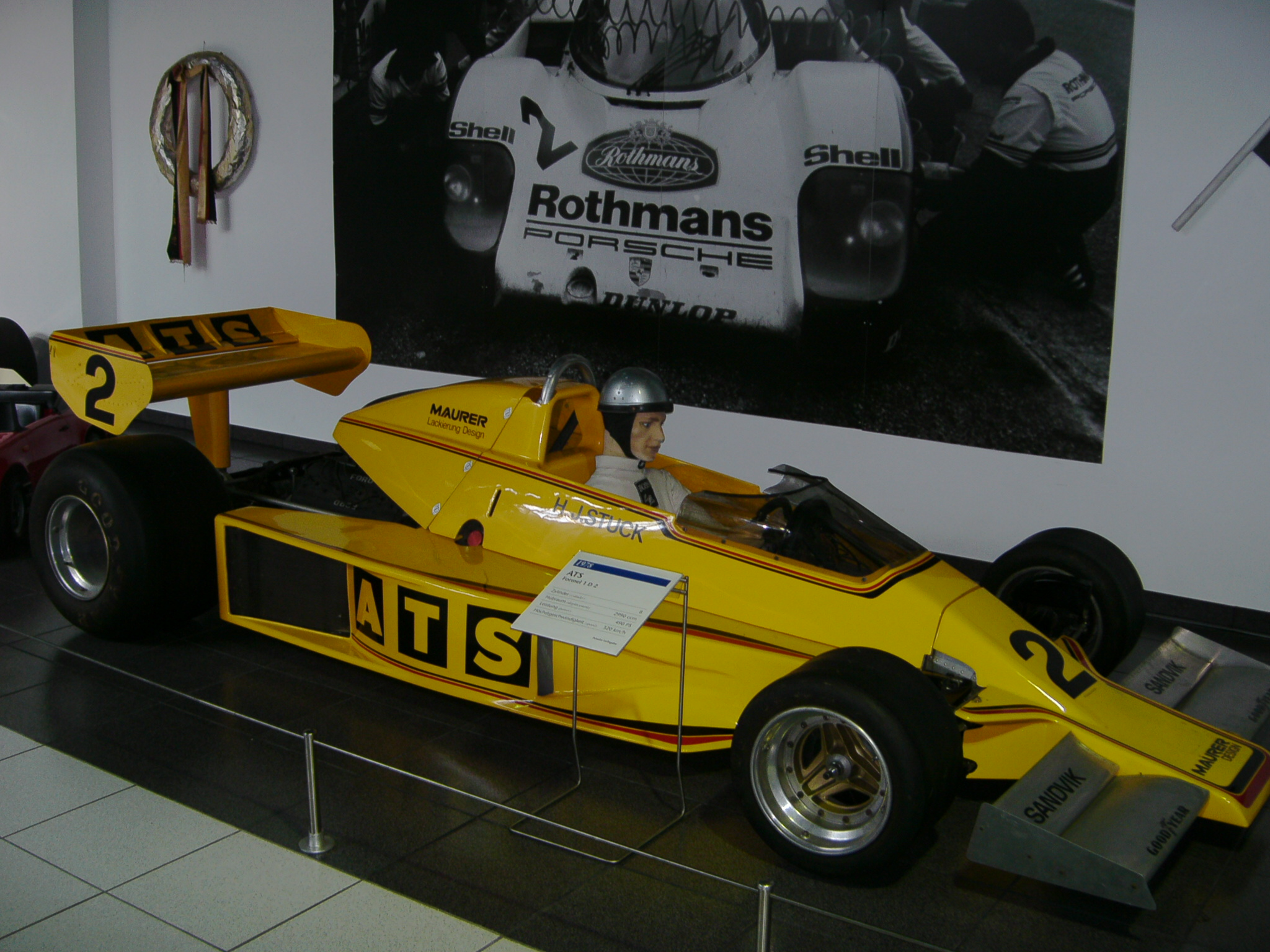 Das ATS Racing Team war ein deutscher Motorsport-Rennstall, der zunächst in der Formel 2 und von 1977 bis 1984 in der Formel 1 engagiert war. Das Team wurde von Günter Schmid initiiert und geführt. Es war, ebenso wie das gleichnamige Unternehmen ATS, in Bad Dürkheim bei Mannheim ansässig. Besitzer des Teams war neben Schmid der Industrielle Erich Stahlschmidt aus dem sauerländischen Werdohl, der die Geschäftsanteile von dem ATS Mitbegründer Bruch erwarb und die rennsportlichen Pläne von Schmid nicht nur protegierte, sondern erst ermöglichte. Als Teamchef fungierte jedoch ausschließlich Schmid. Er war in den 1960er-Jahren selbst Rennfahrer gewesen und hatte eine Reihe von Rennen in der Formel V bestritten. Seine letzten Rennen fuhr er 1972, als er sich bereits hauptberuflich bei dem Felgenhersteller engagierte. Danach sponserte Schmid verschiedene nationale Motorsportveranstaltungen, bevor sich sein Unternehmen aktiv am Motorsport beteiligte, um für die Marke ATS zu werben. Quelle: Photo by